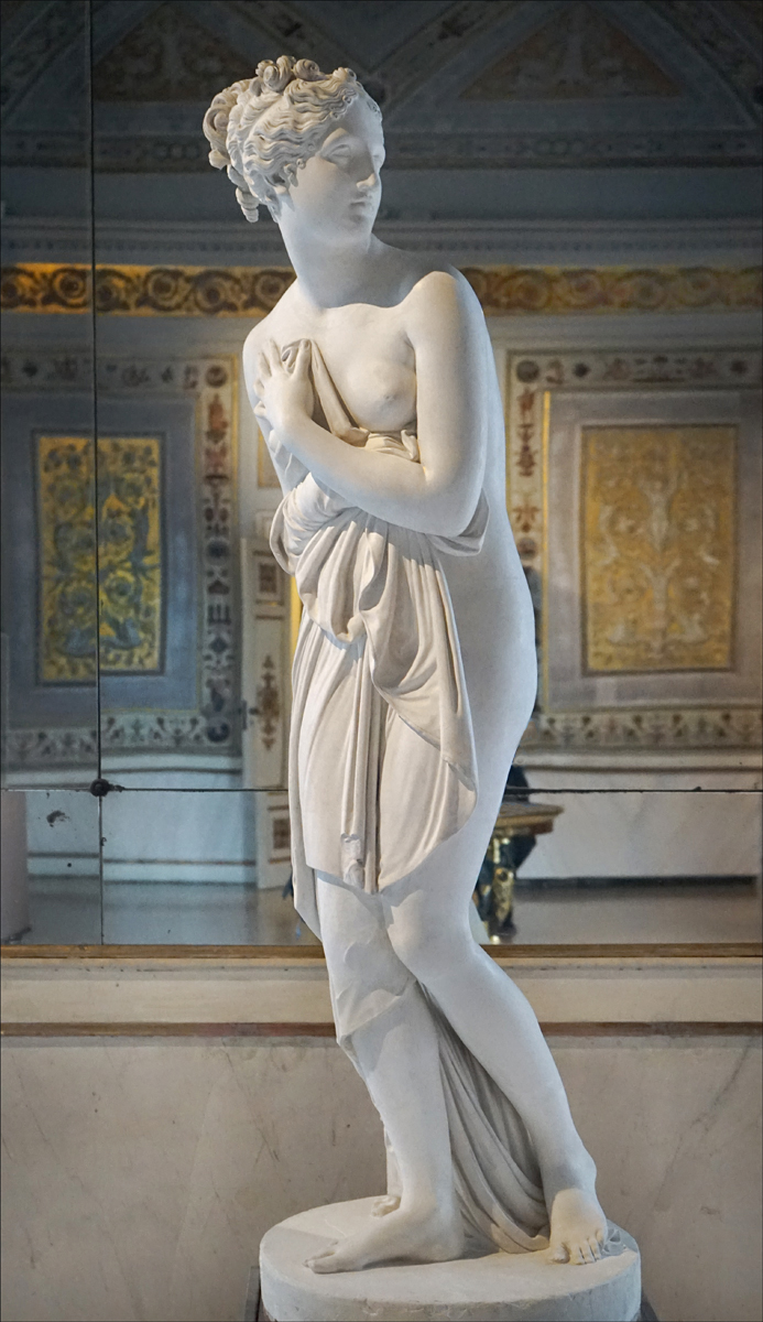 Venere Italica Sculpture d'Antonio Canova (1757-1822) 1804-1811 plâtre 50,2x172,1x67,9cm Procuratie Nuove Musée Correr, Venise Voir le monument à Antonio Canova à Venise (photo dalbera)